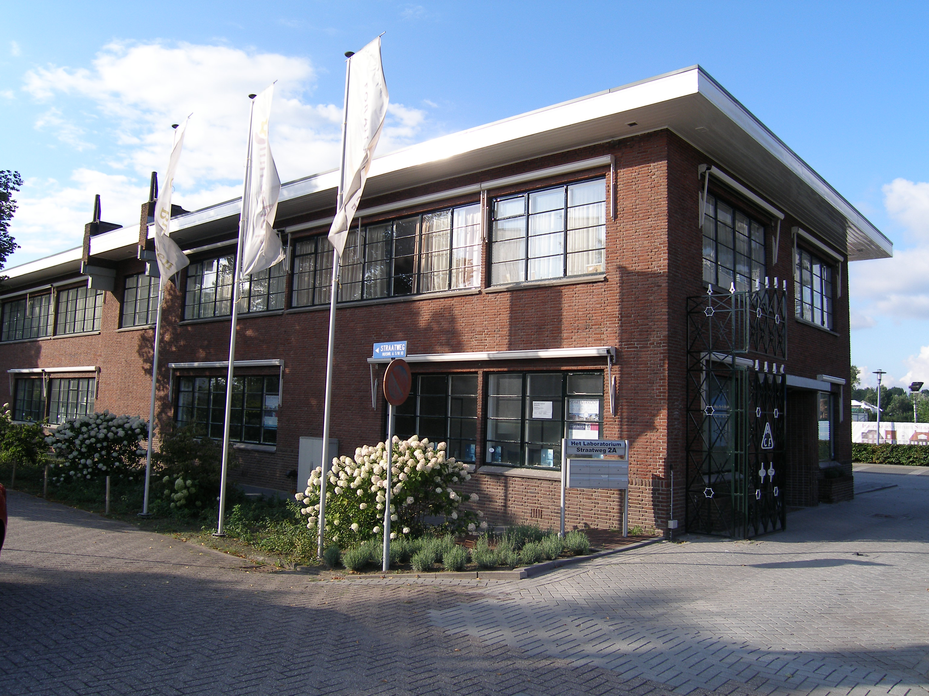 Project rijksmonumenten Maarssen